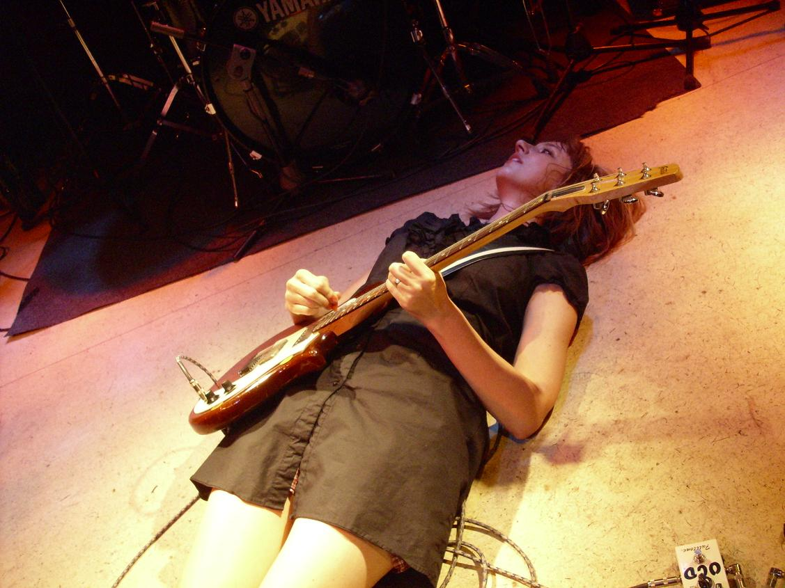 Sala El Sol Madrid , 20 Febrero 2009